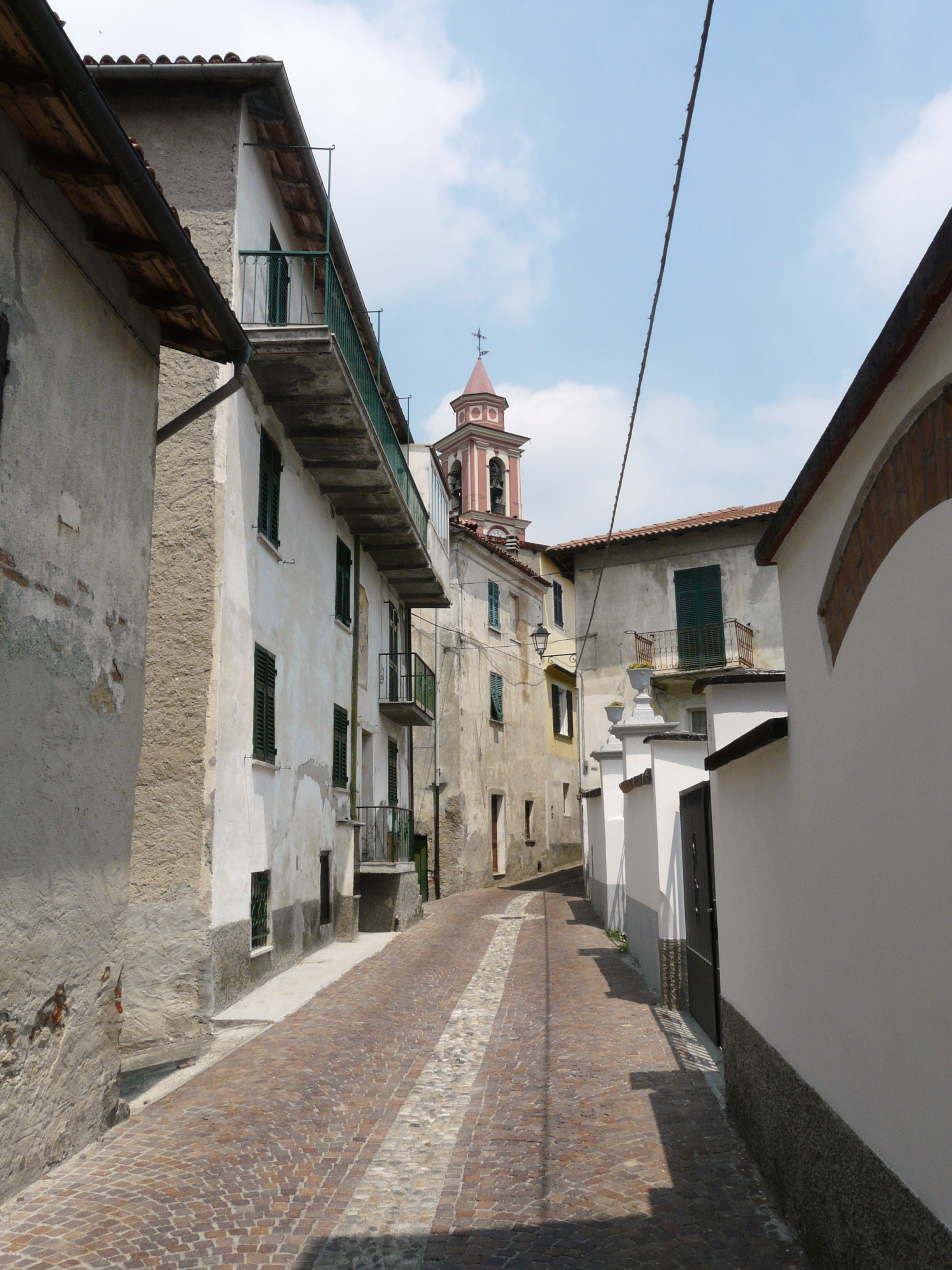 Centro storico, Parodi Ligure, Piemonte, Italia